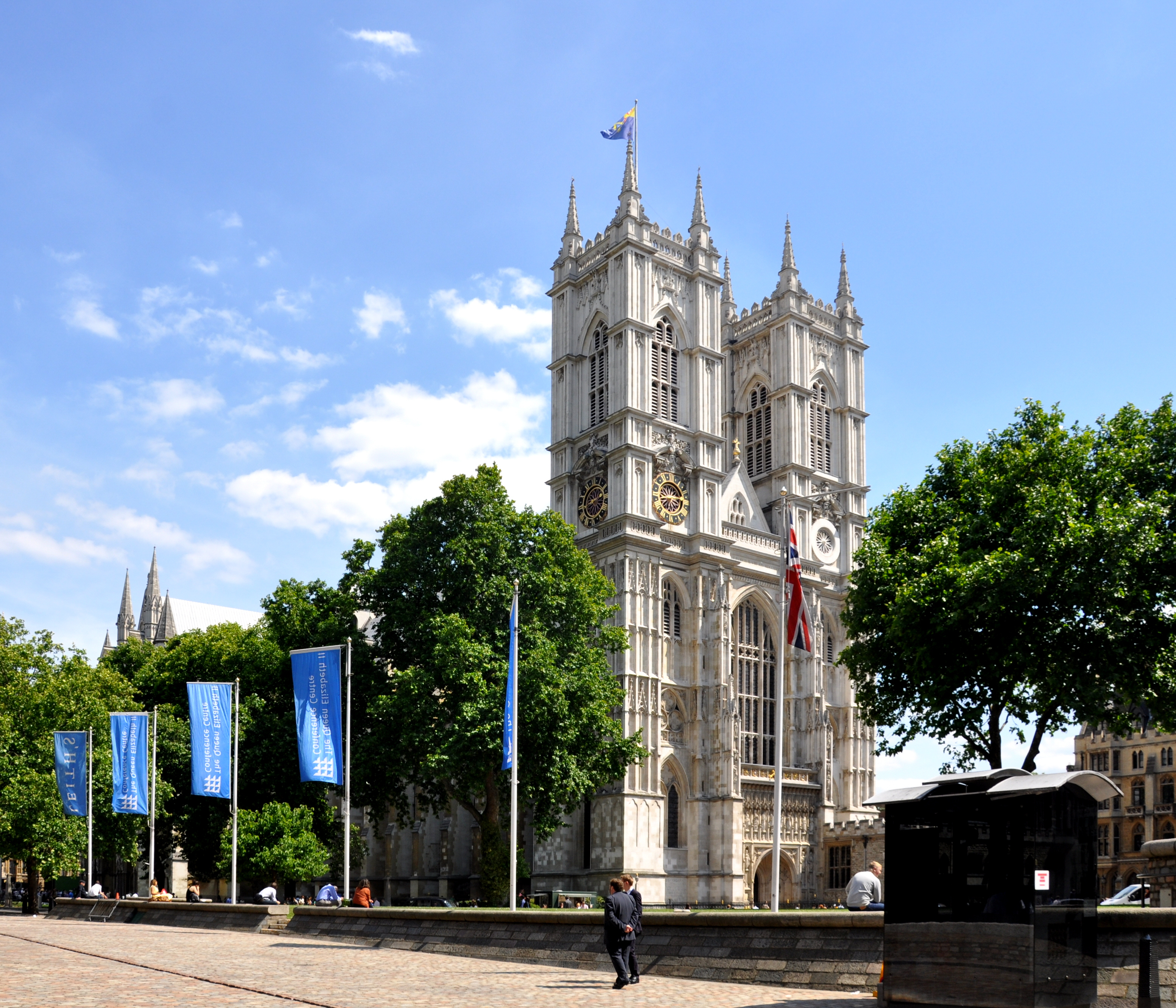 London, Westminster Abbey